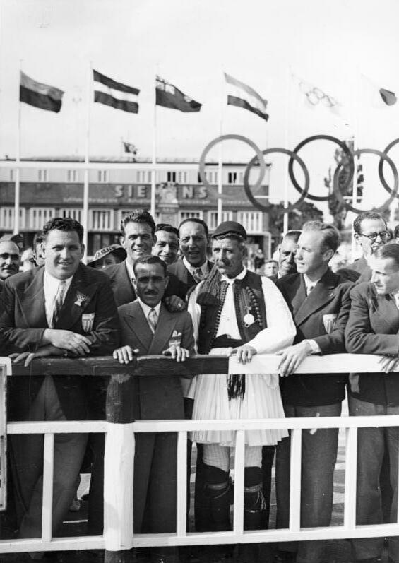 Berlin, Olympiade, Spyridon Louis Ankunft des griechischen Prinzen Paul auf dem Flughafen Tempelhof. Der Olympiasieger im Marathonlauf von 1896, Spiridon Louis, mit griechischen Olympiakämpfern in Erwartung des Prinzen Paul. 1936 [Berlin, Olympische Sommerspiele.- Spyridon Louis mit griechischen Olypmia-Teilnehmern am Flughafen] Abgebildete Personen: Louis, Spyridon: Leichtathlet, Marathonsieger 1896, Griechenland